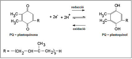 Reacció de reducció de la plastoquinona